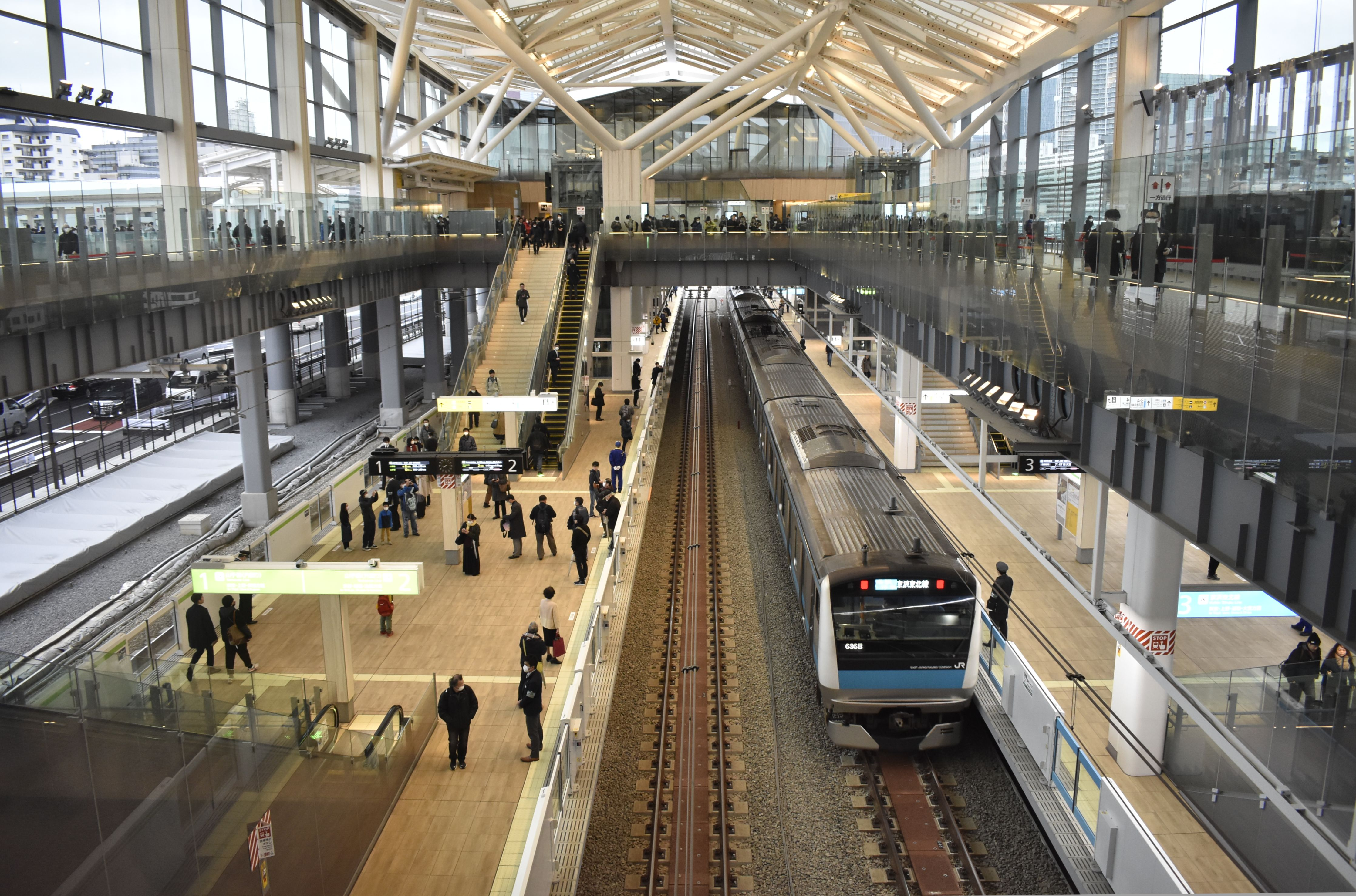 高輪ゲートウエイ駅